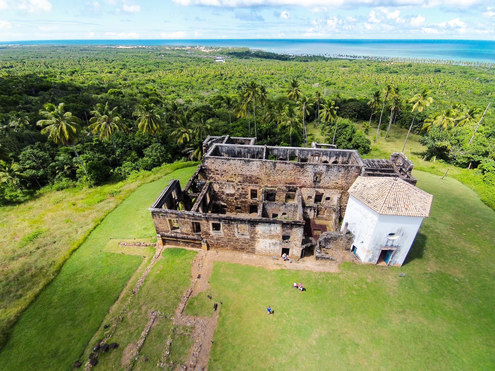 Ruínas do Castelo Garcia D'Ávila, na Praia do Forte, Bahia. Foto feita por drone